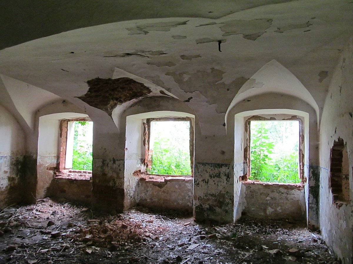 Асада Дзедзіна. Сядзіба